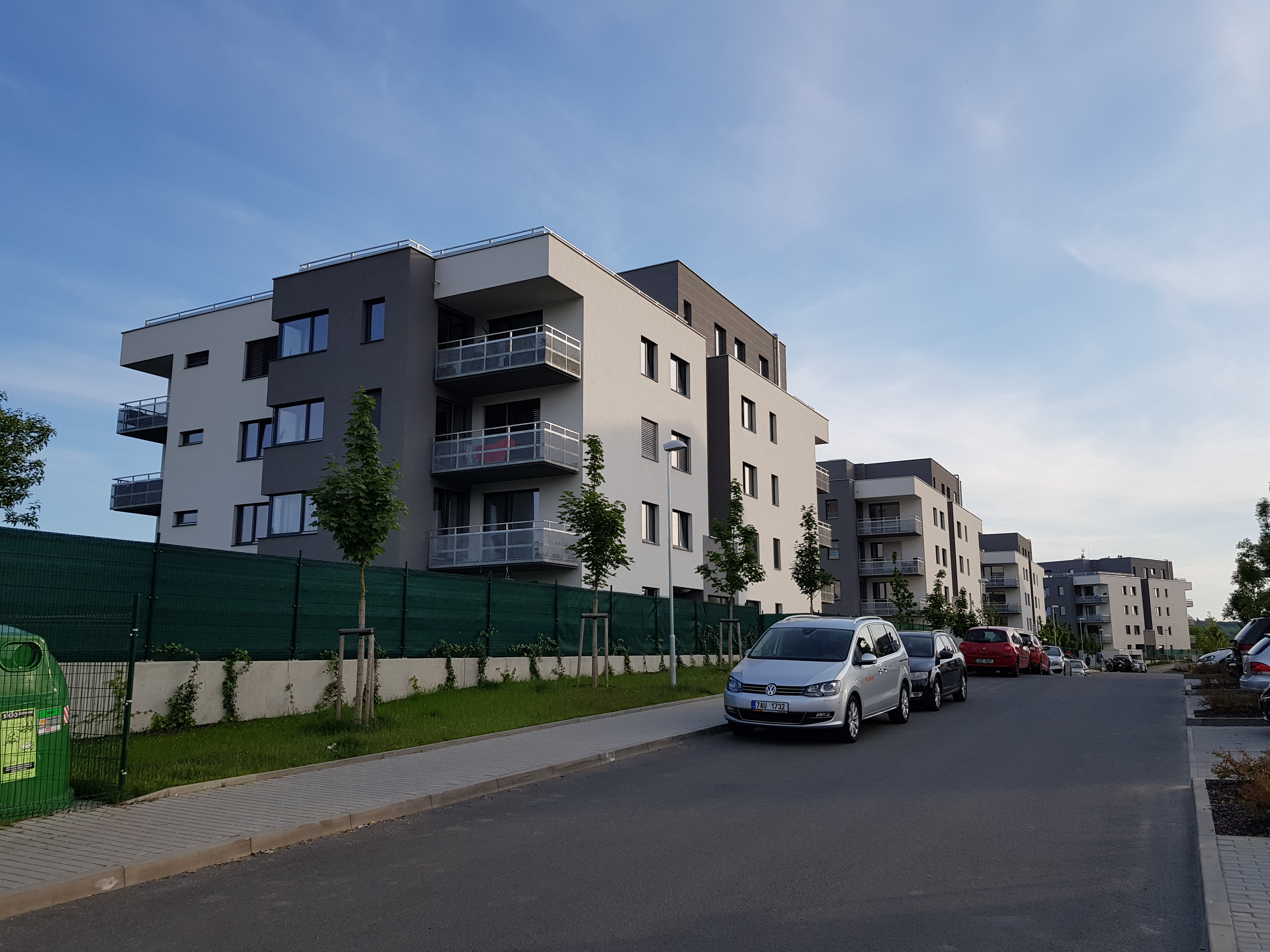 Praha 9-Vysočany, Developerský projekt Zátiší Rokytka, z ulice Svatošových